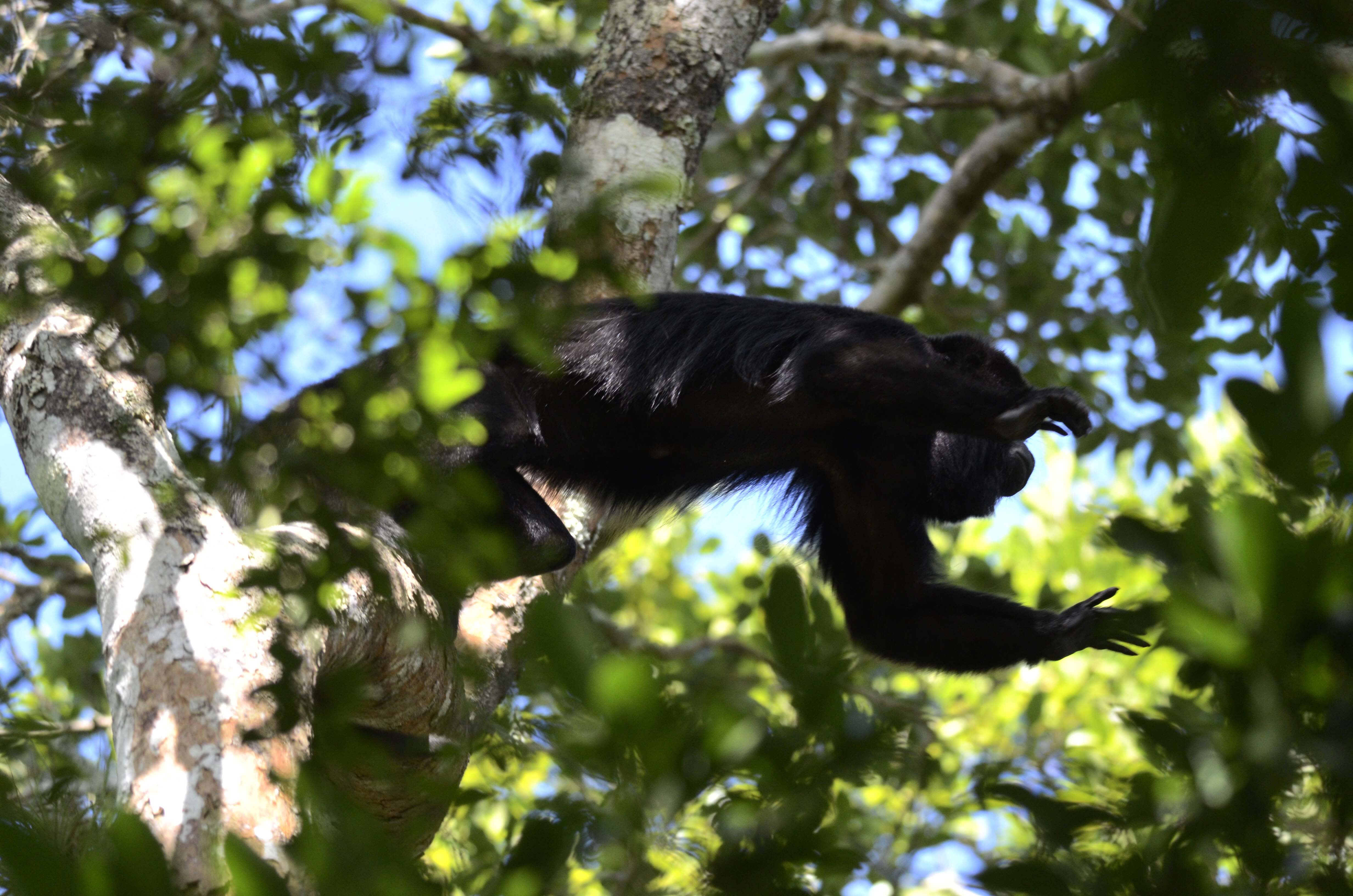 Campeche, México